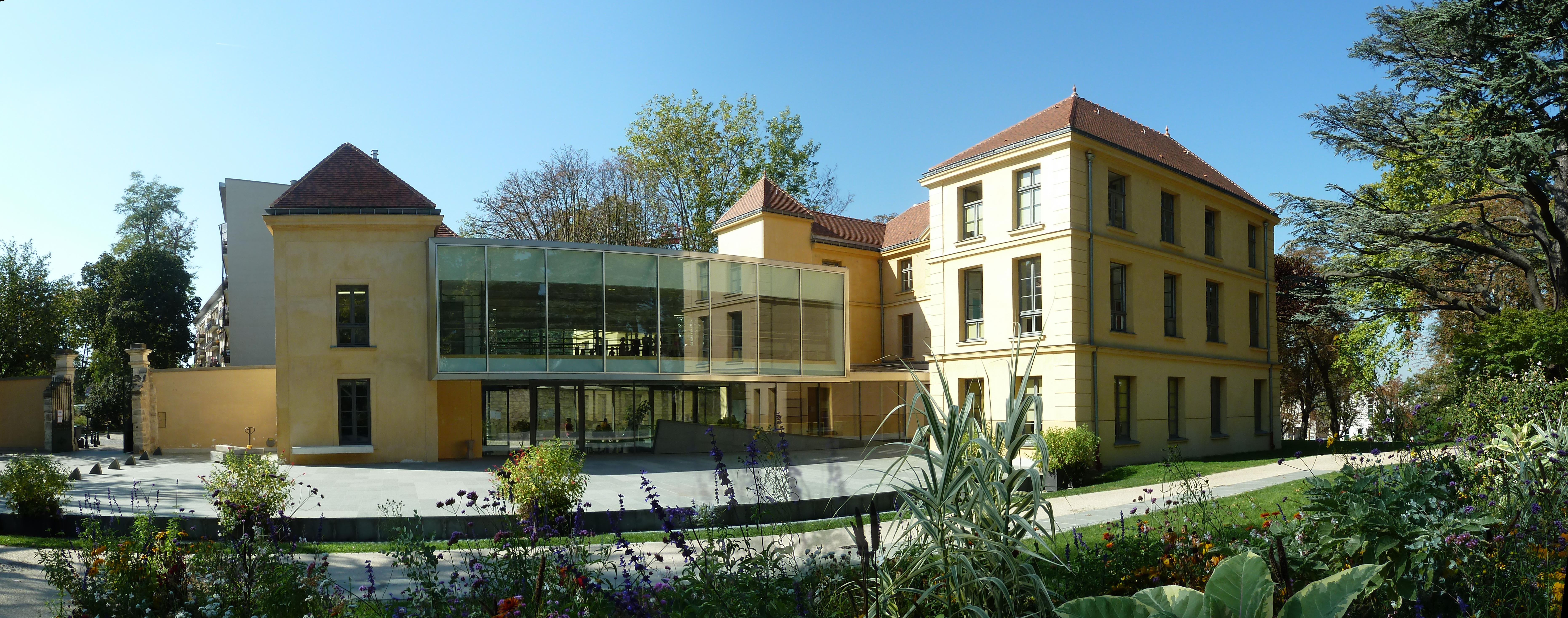 Maison de Richelieu - Bagneux - Haut-de-Seine – France – Mérimée PA00088068 This building is en partie classé, en partie inscrit au titre des Monuments Historiques. .